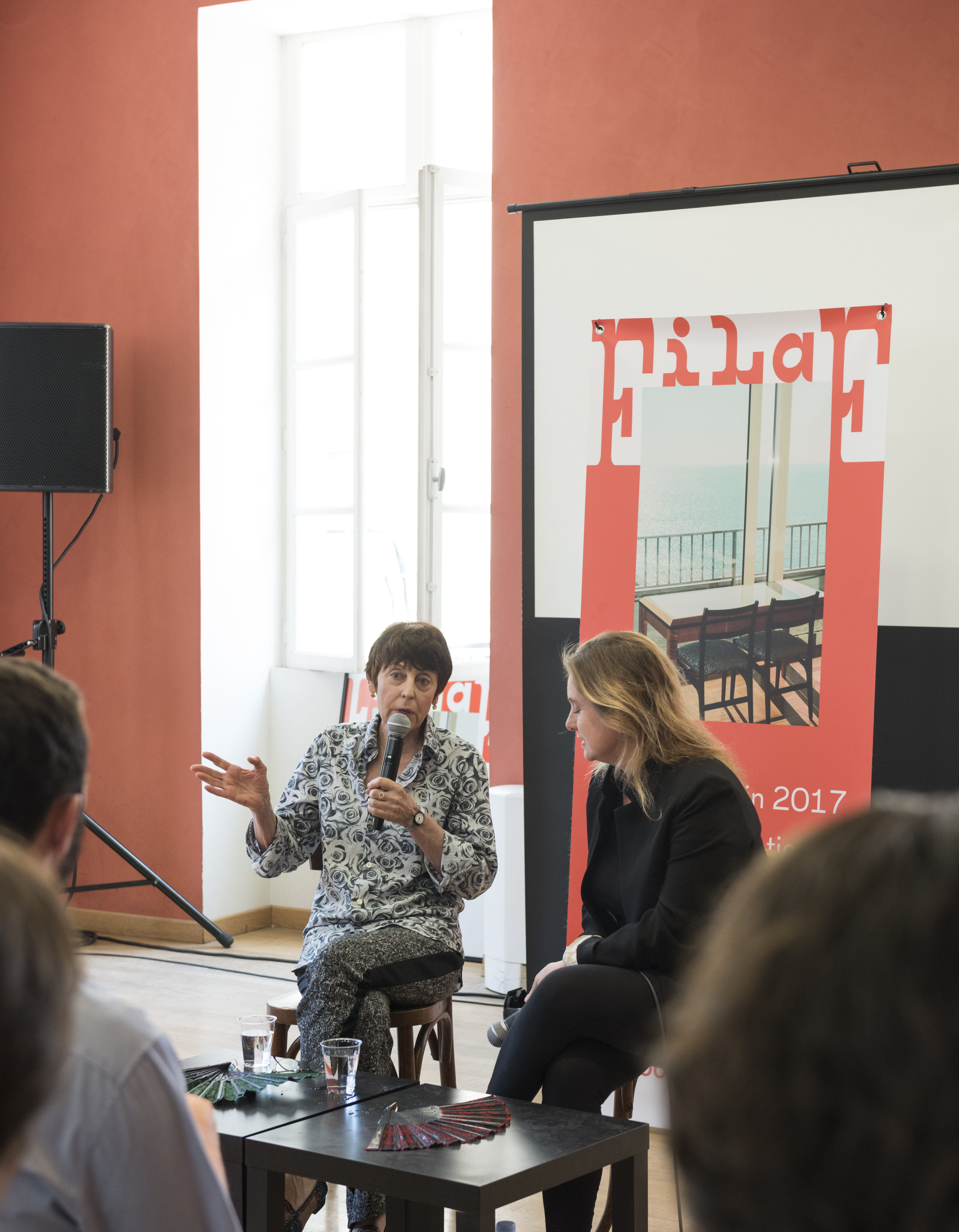 FILAF 2017 - Annette Messager et Chiara Parisi